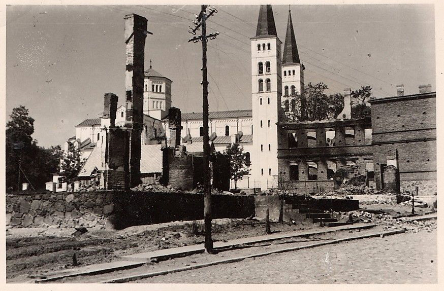 Rietavo bažnyčia 1941 m. birželį.